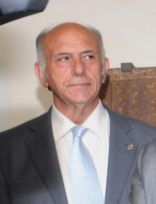 UNED: "Homenaje a Adolfo Suárez. Lecciones para el futuro" Ávila, 12 de junio de 2014